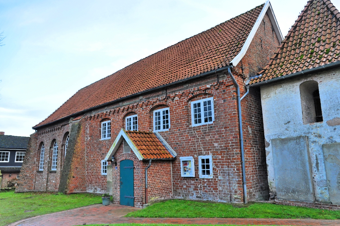 Neuenwalde 2012